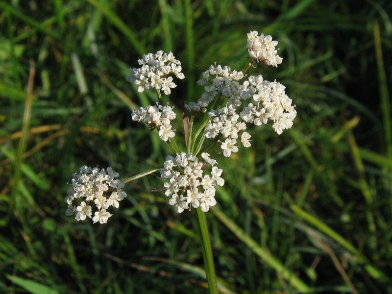 Wiesen-Wasserfenchel (Oenanthe lachenalii)